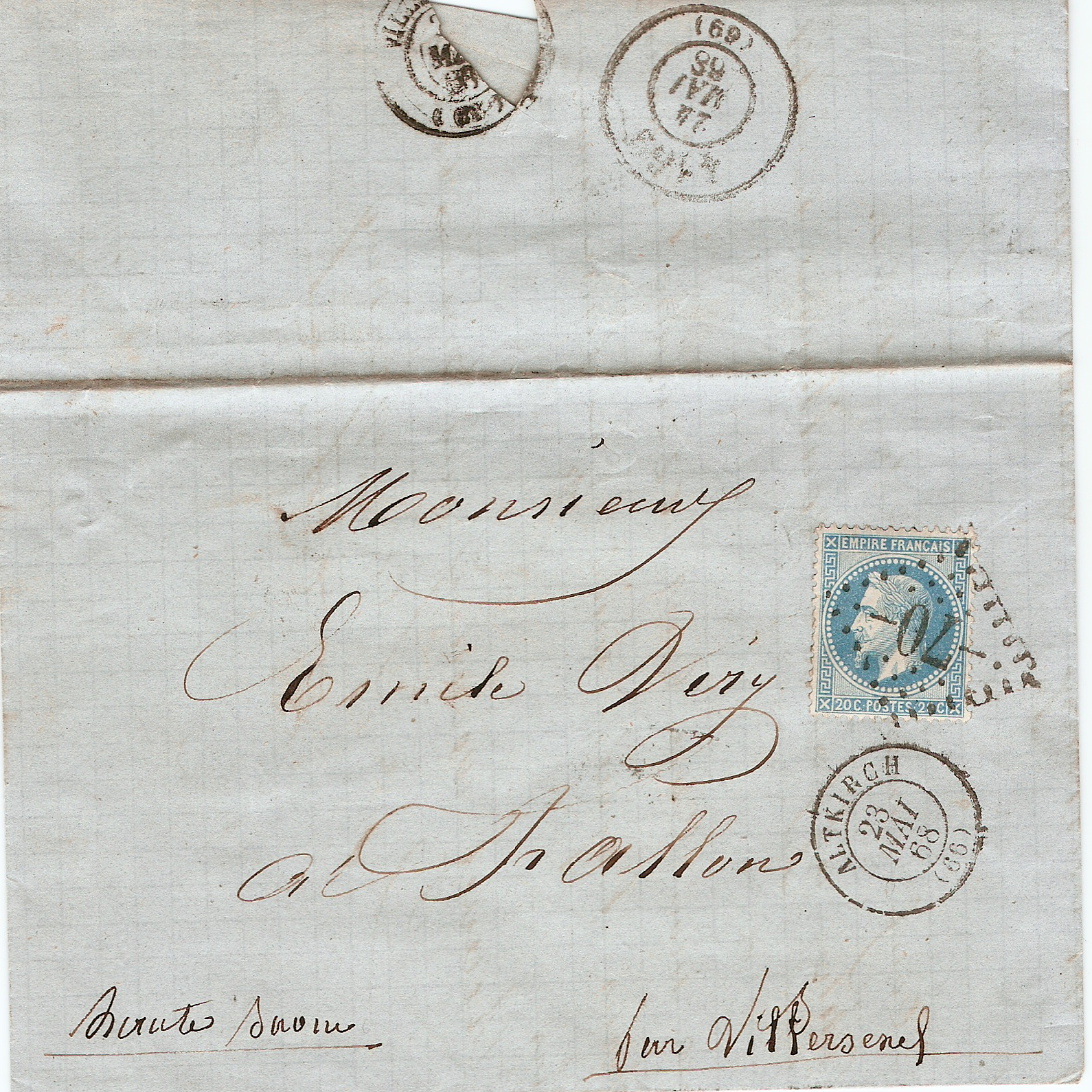 Lettre France Altkirch 1868, affranchie avec un 20 c bleu Napoléon lauré de 1868 et oblitérée avec un cachet Gros Chiffres 70 - Cachet de bureau de passe Vesoul 4169 au verso.